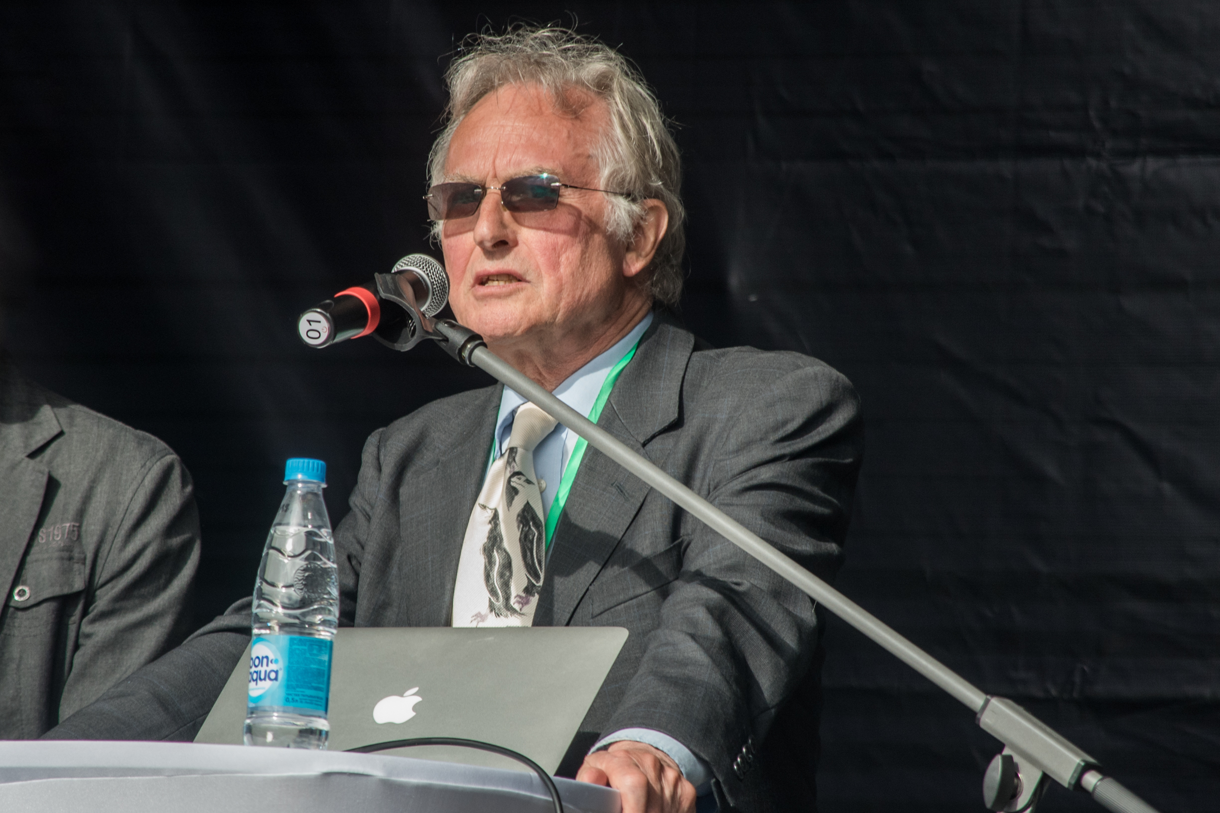 Ричард Докинз (вице-президент Британской гуманистической ассоциации) на Geek Picnic 2017